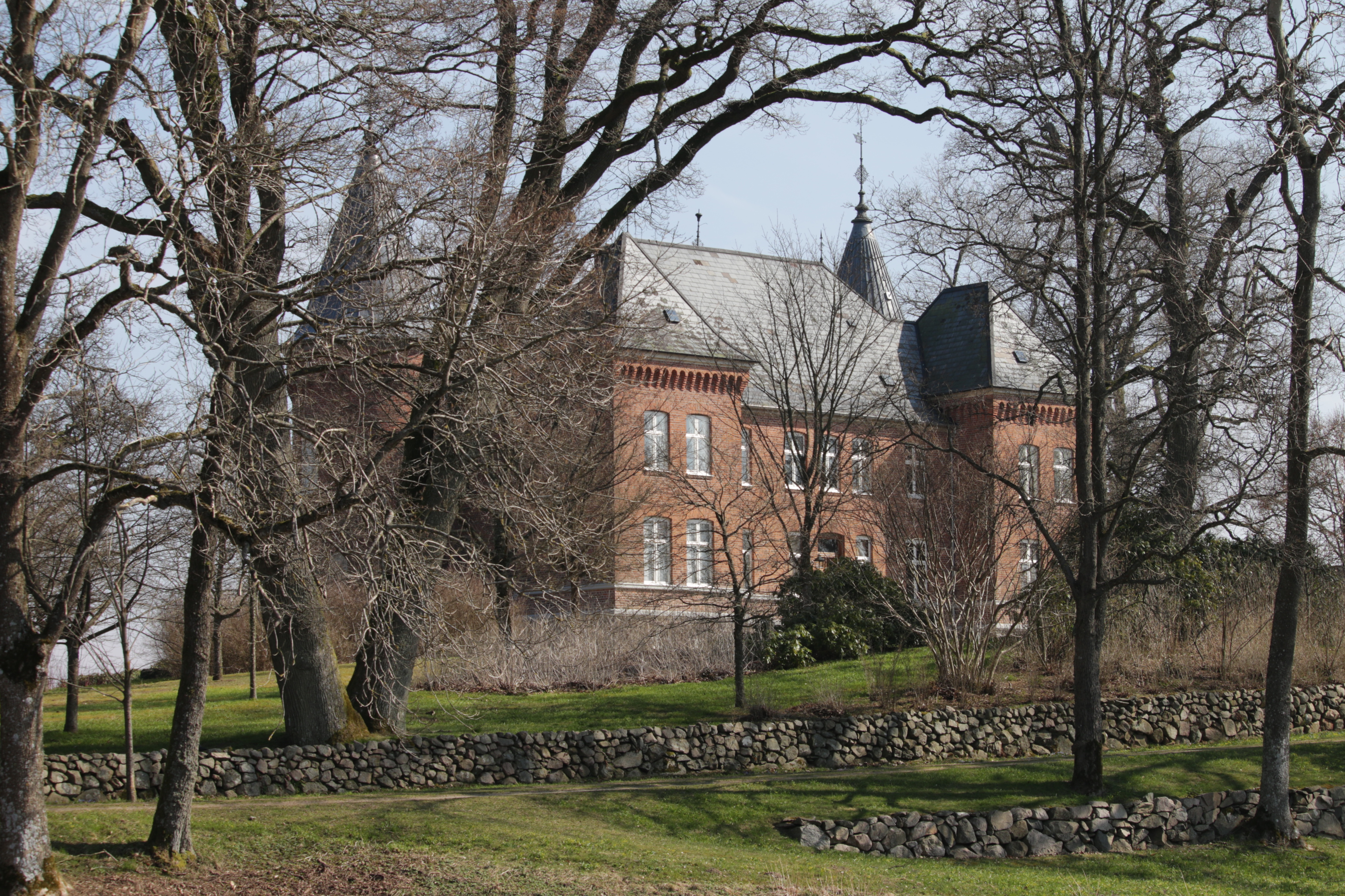 Kvesarums slott april 2018